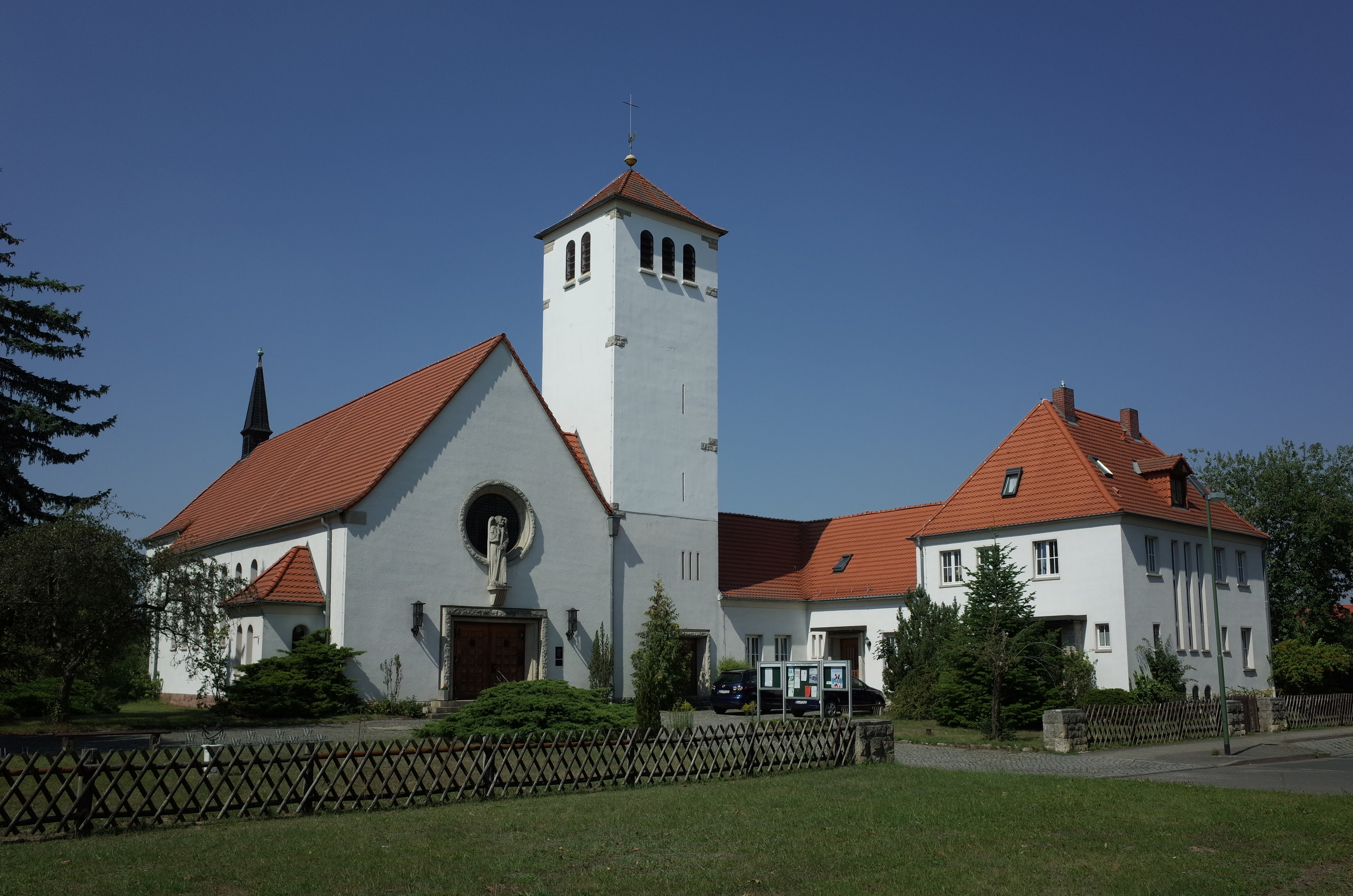 Dessau-Roßlau, Kirche der Gemeinde Hl. Dreieinigkeit Dessau Süd (Baudenkmal im Denkmalverzeichniss Sachsen-Anhalt, Erfassungsnummer: 094 40873 000 000 000 000 [1])